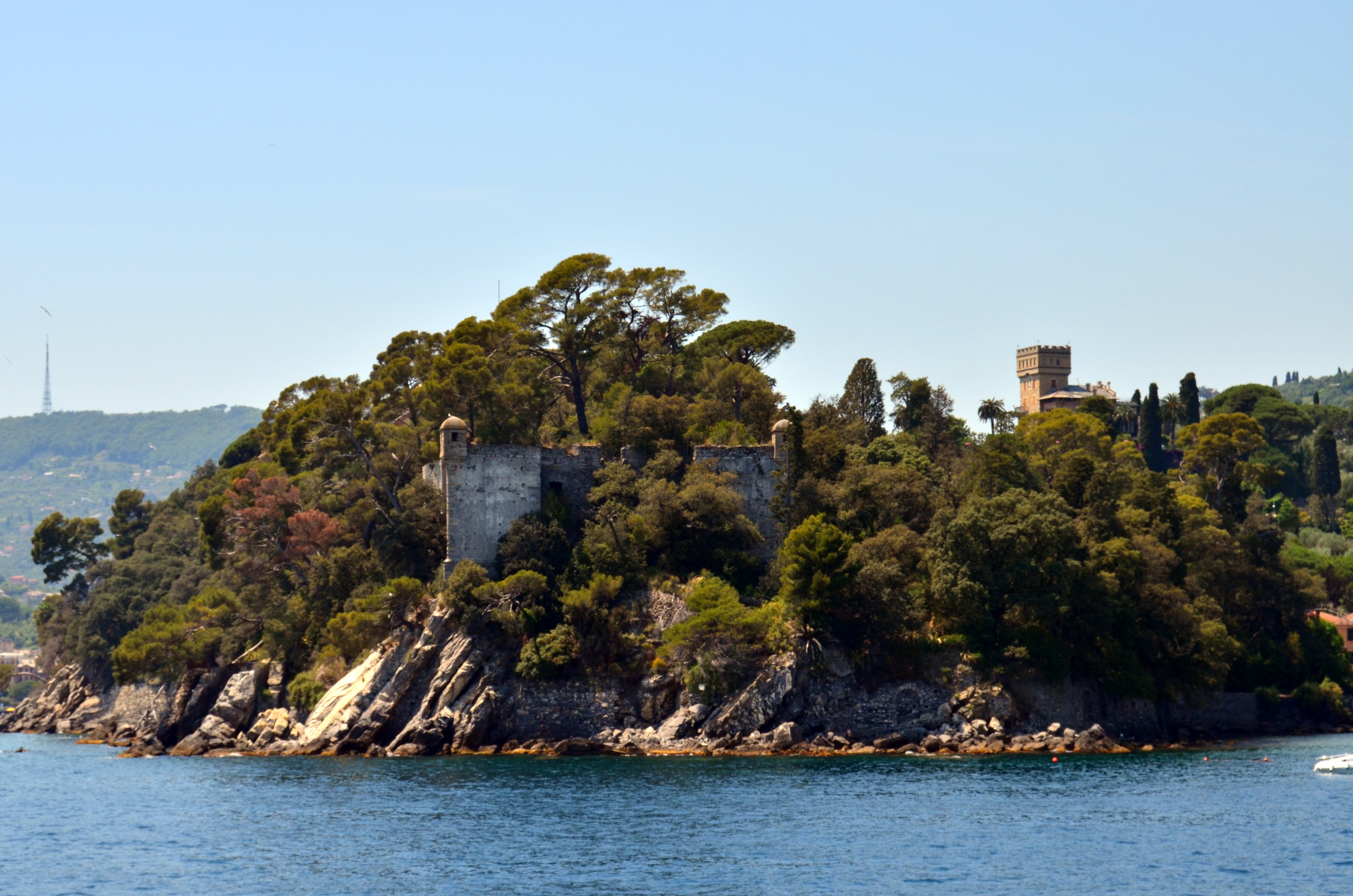 Undetermined language : Il castello di Punta Pagana, San Michele di Pagana, Rapallo, Liguria, Italia